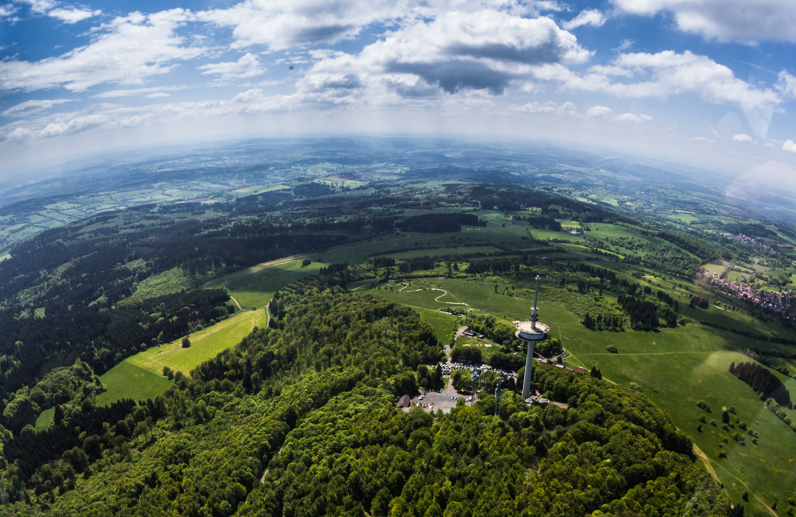 Luftbild des Hoherodskopfs (Vogelsberg), im Hintergrund das Segelfluggelände des Flugsportclubs Rüsselsheim e.V.